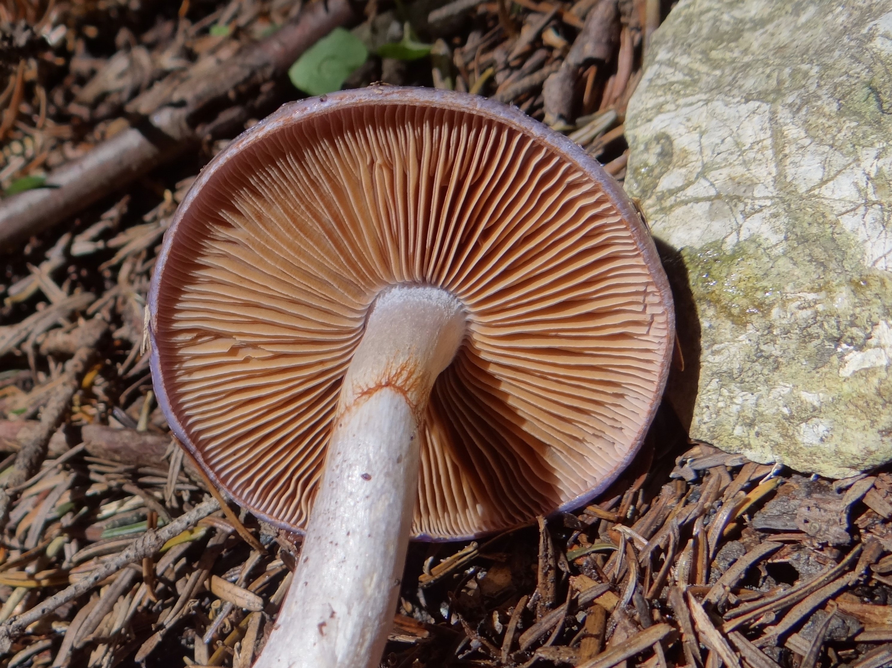 Cortinarius salor (location:Poland, Pieniny, rejon przełęczy Trzy Kopce)